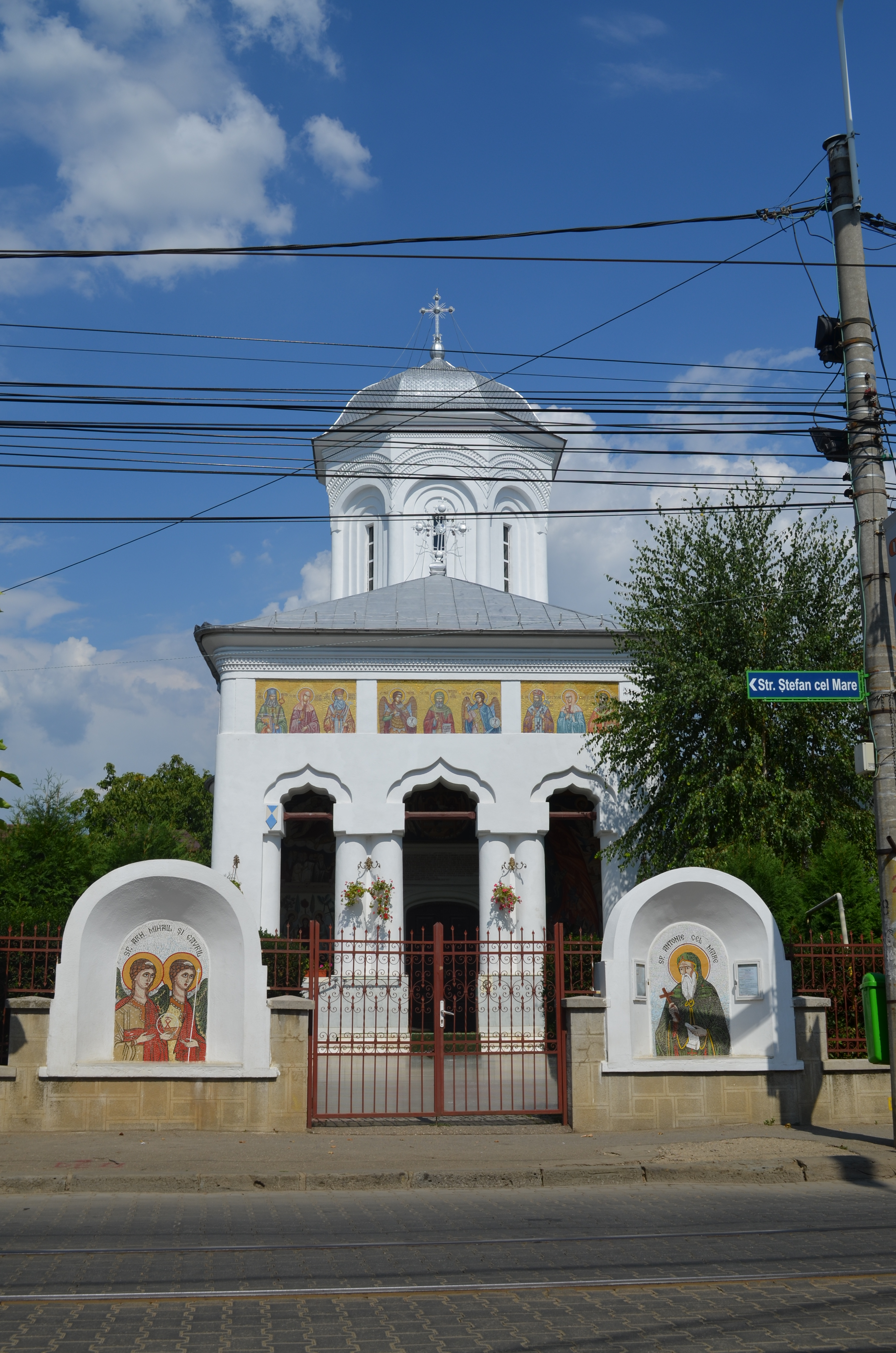 Biserica "Sfinții Voievozi", Str. Ștefan cel Mare nr. 23, Ploiești